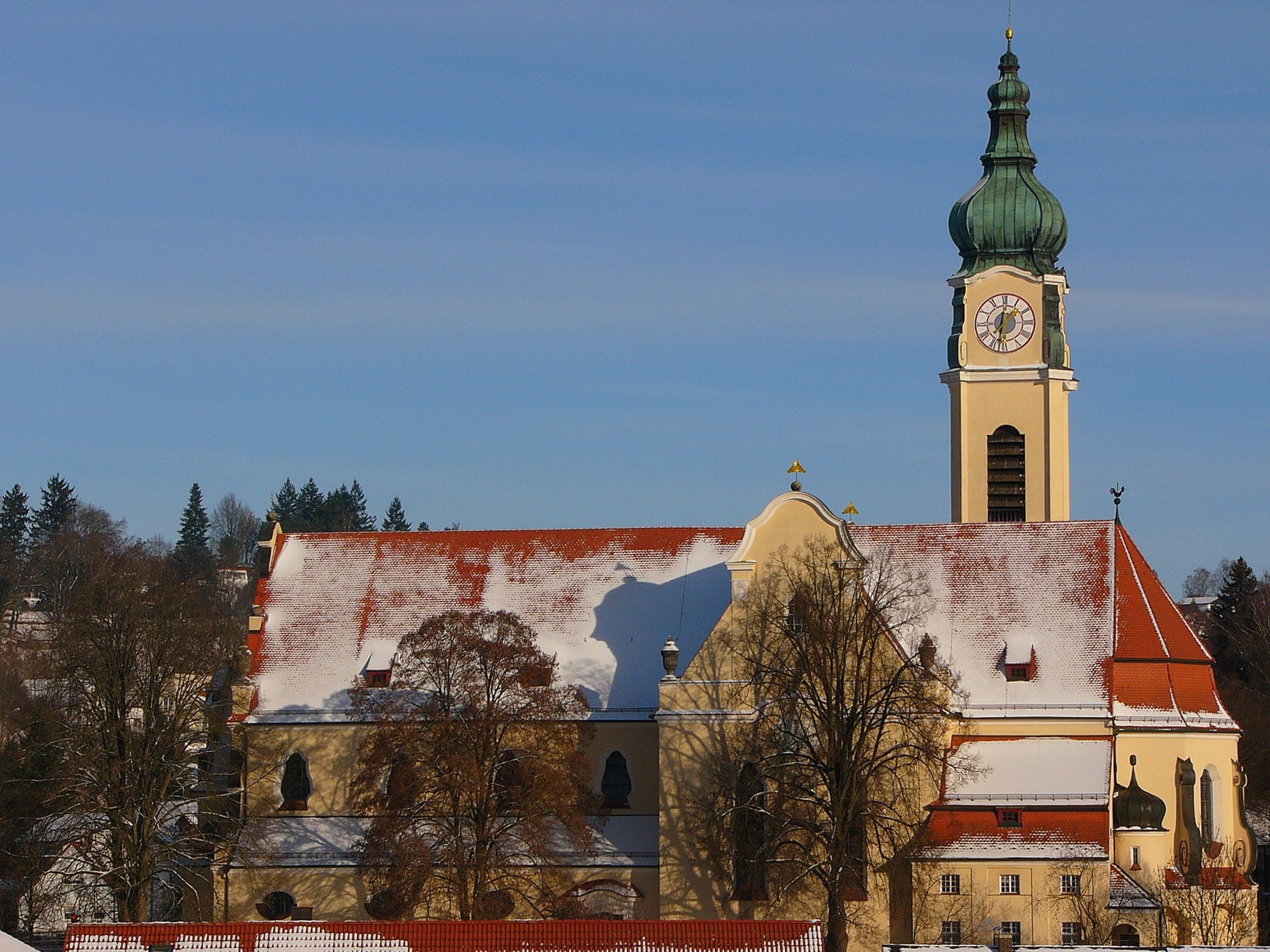 Kath. Pfarrkirche St. Margareta; neubarock.This is a photograph of an architectural monument.